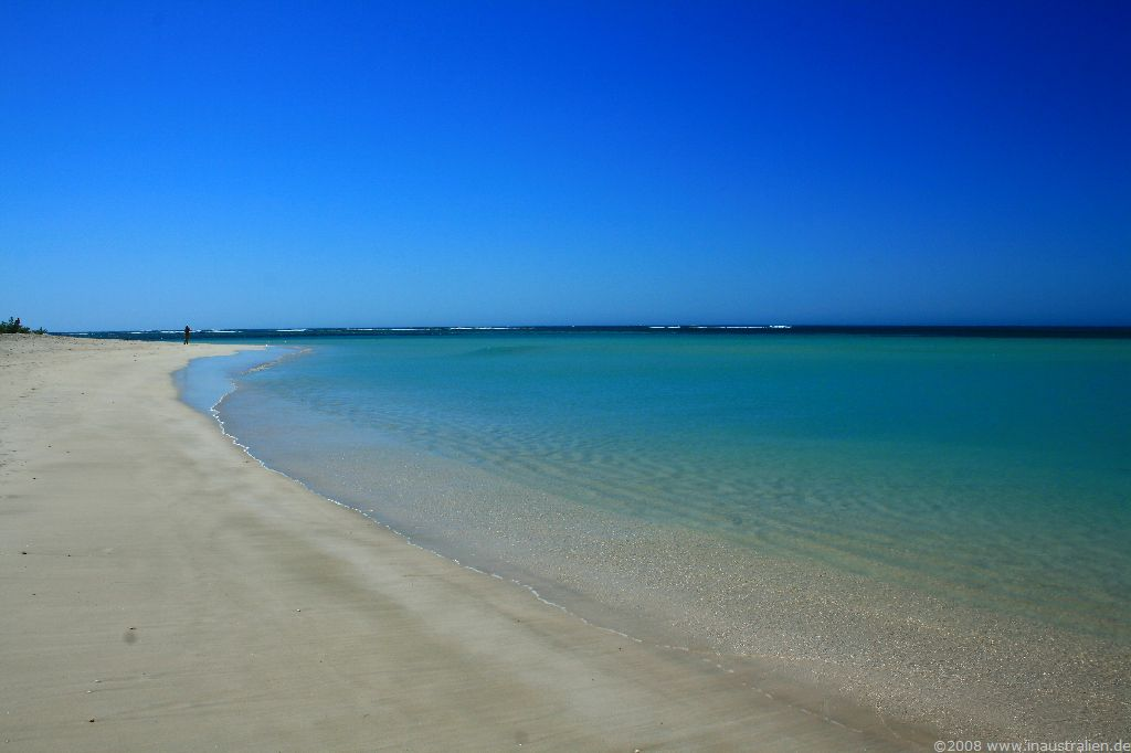 Definitiv die schönste Bucht an der Westlüste. Gnaraloo Bay.